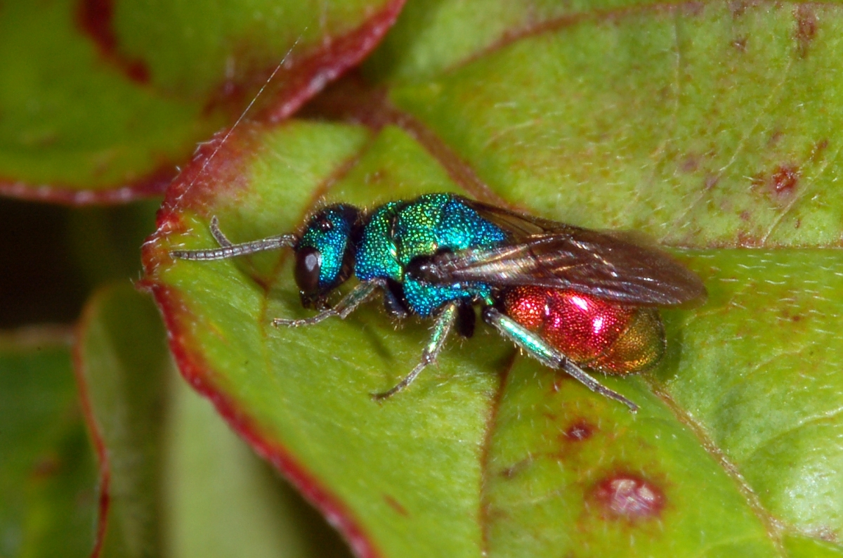 Chrysididae, Omalus spec., det. S. Tischendorf, Knüllwald, Hessen, Deutschland